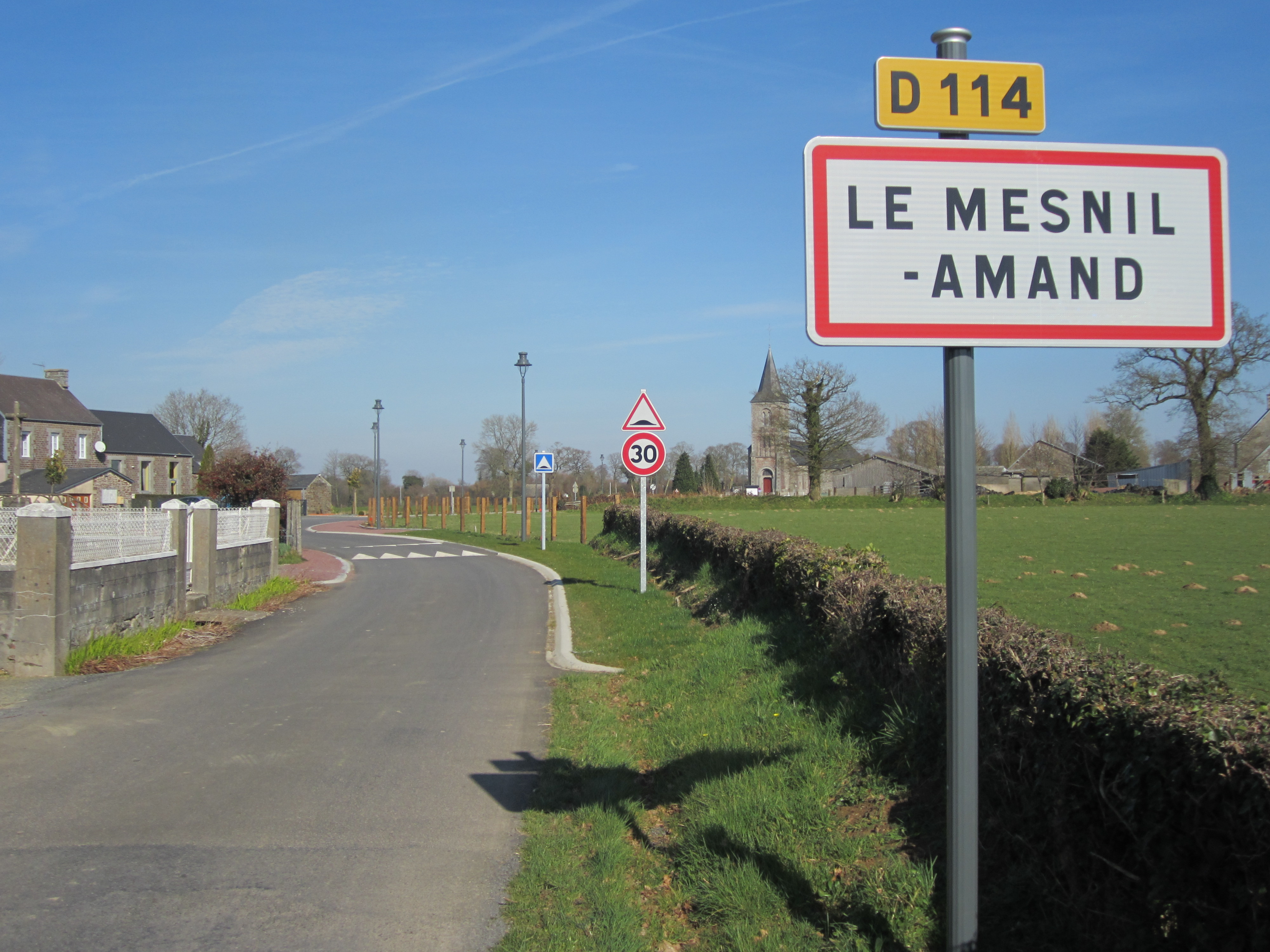 Le Mesnil-Amand, Manche